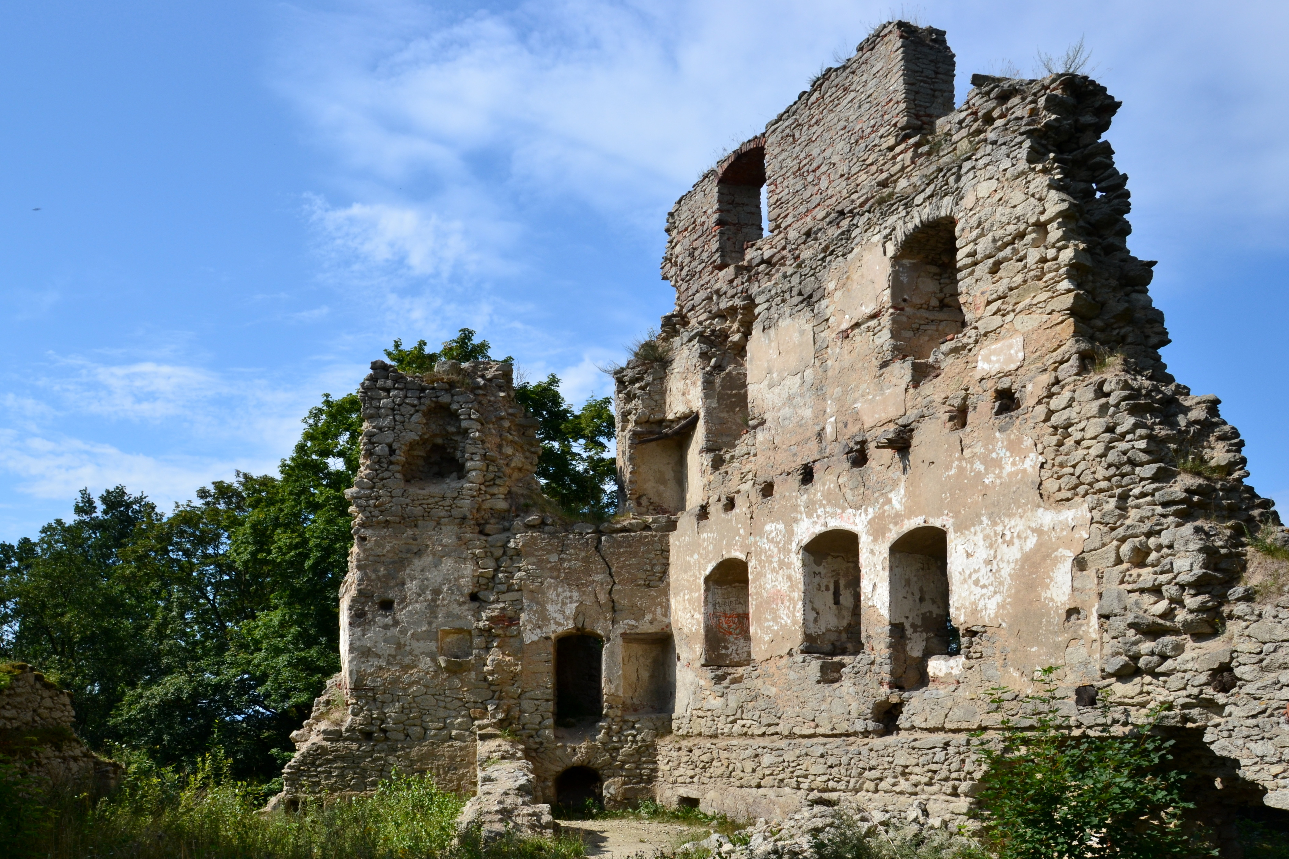 Hrad Starý rybník, zřícenina (Starý Rybník), Starý Rybník 1